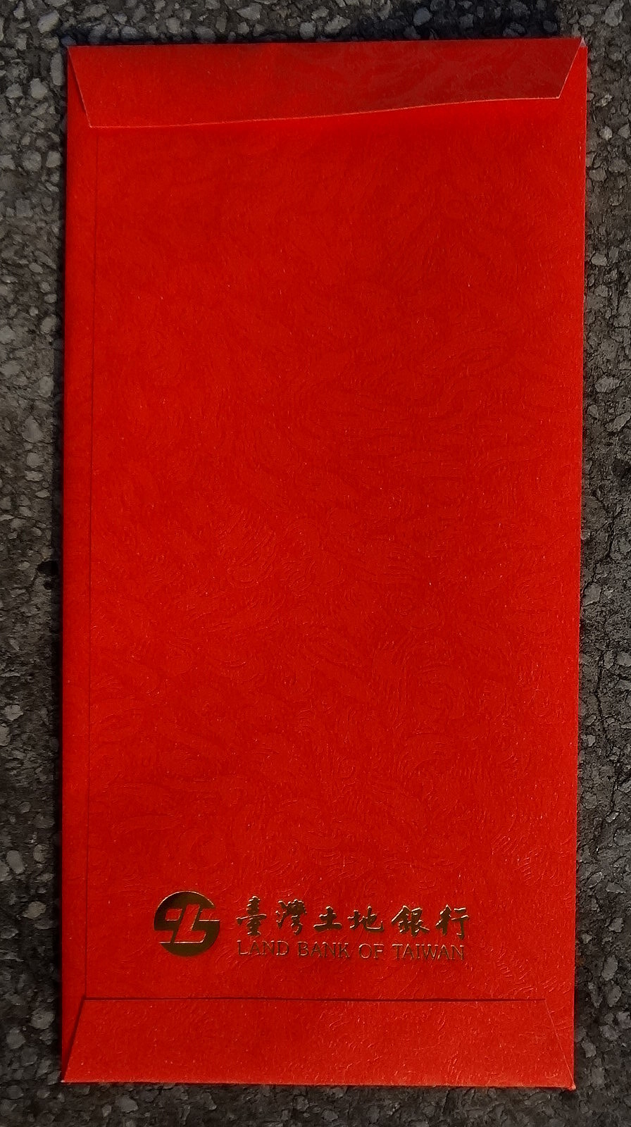 2015年臺灣土地銀行紅包袋。